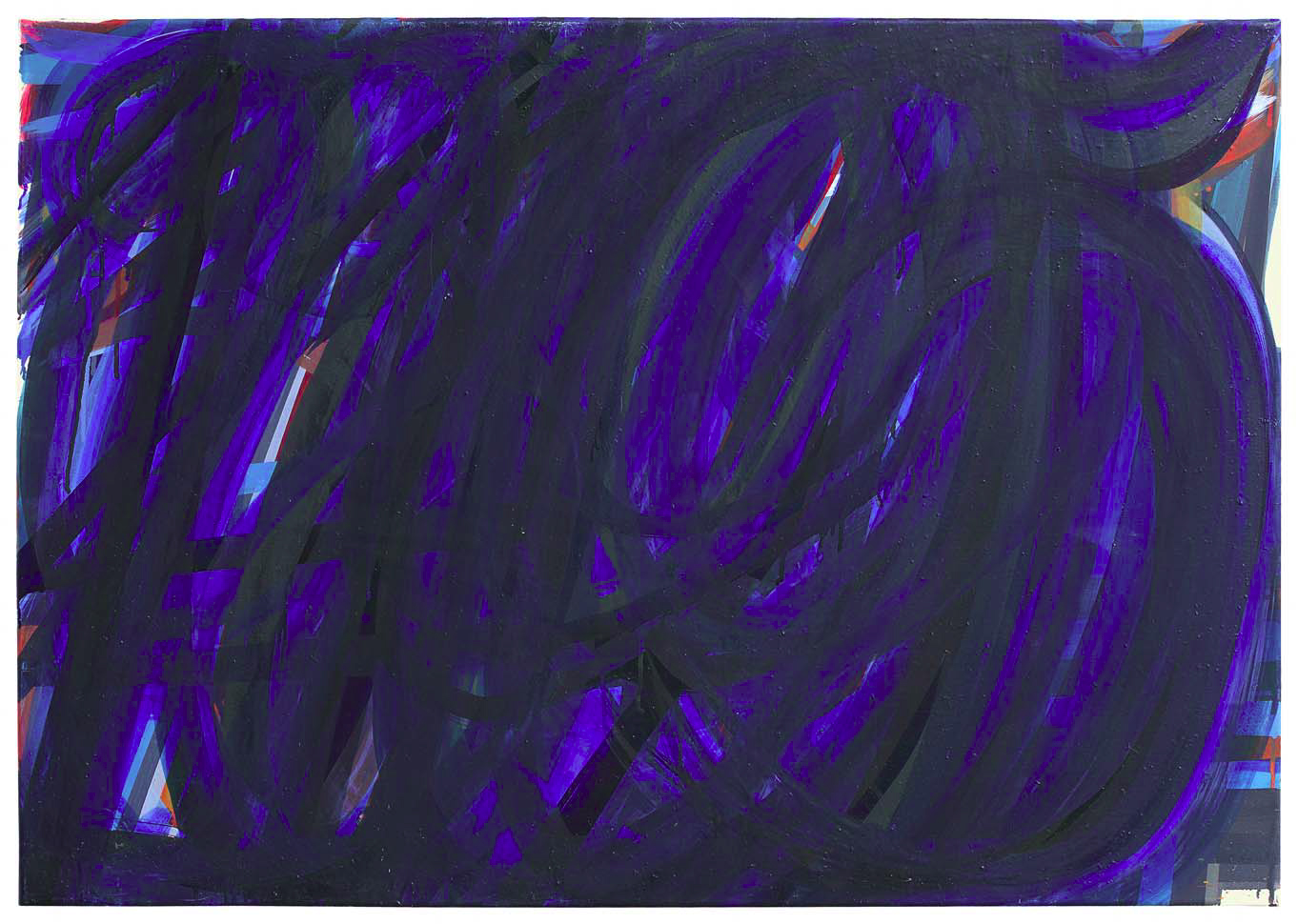 Öl auf Leinwand Titel 22/95 - aus dem Jahr 1995 70x100cm